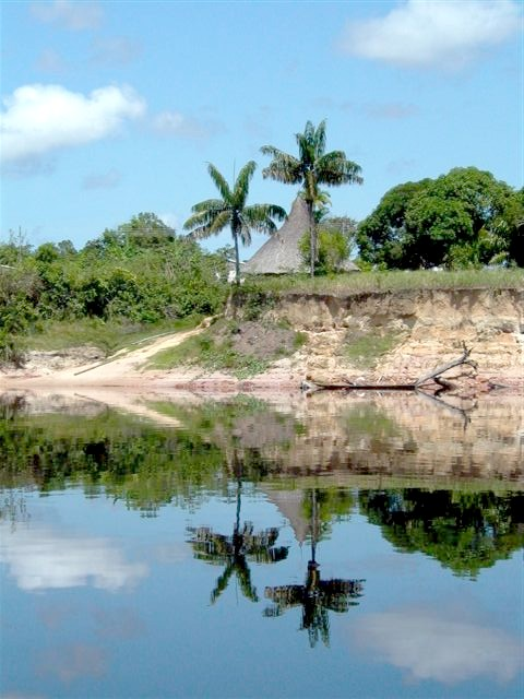 San Fernando de Atabapo, Estado Amazonas - Venezuela (2002)